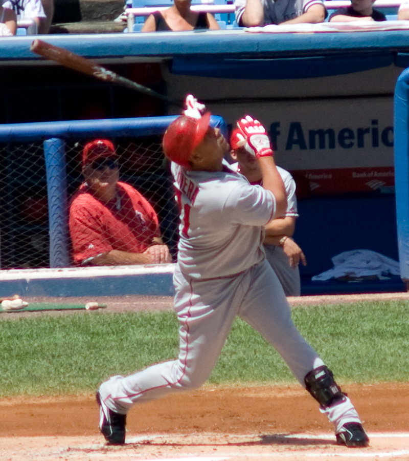 Juan Rivera